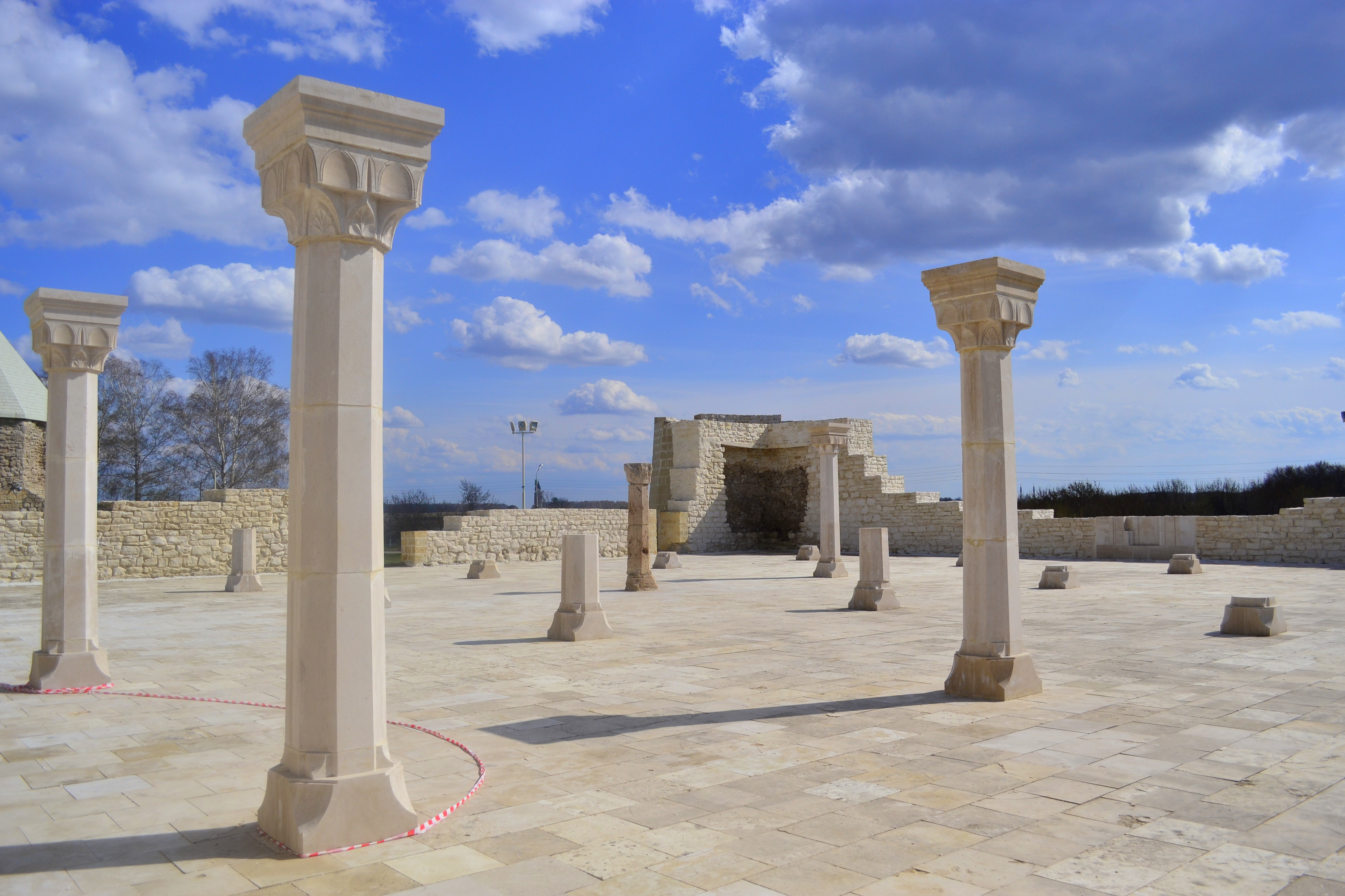 Комплекс памятников архитектуры XIII-XIV вв. на территории Булгарского городища (архитектурный комплекс «Болгары») (Республика Татарстан, Болгар, село Болгары, городище)